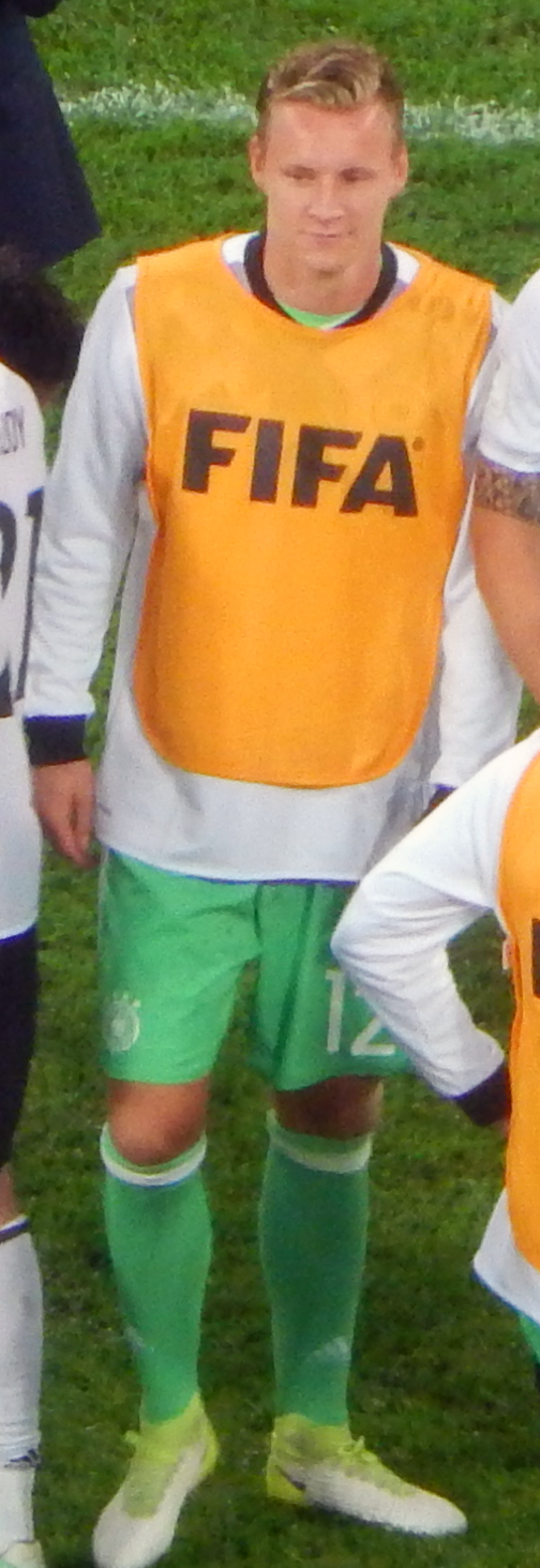 Финал Кубка конфедераций 2017